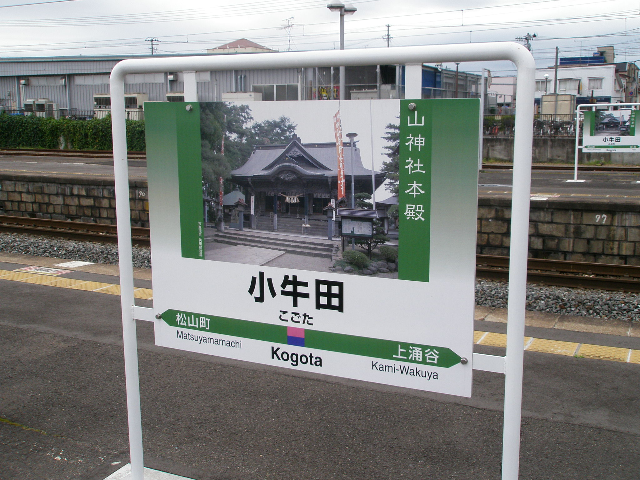 小牛田駅駅名標。美里町の山神社の写真が入っている。